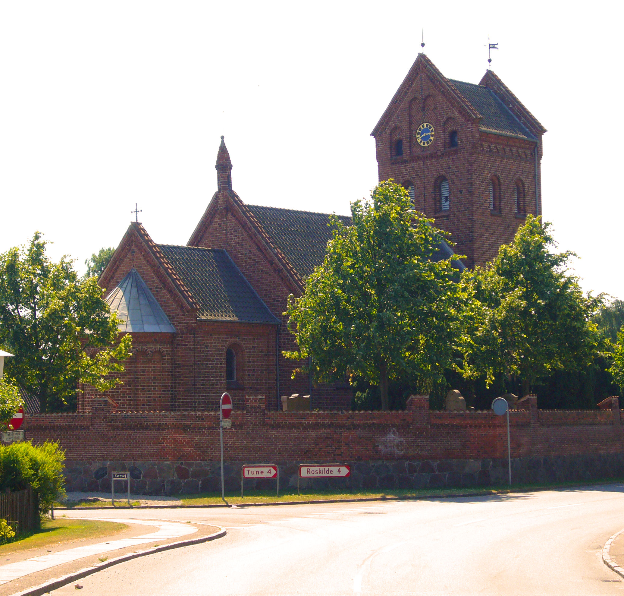 Vindinge Kirke, Roskilde County, Denmark. View from north